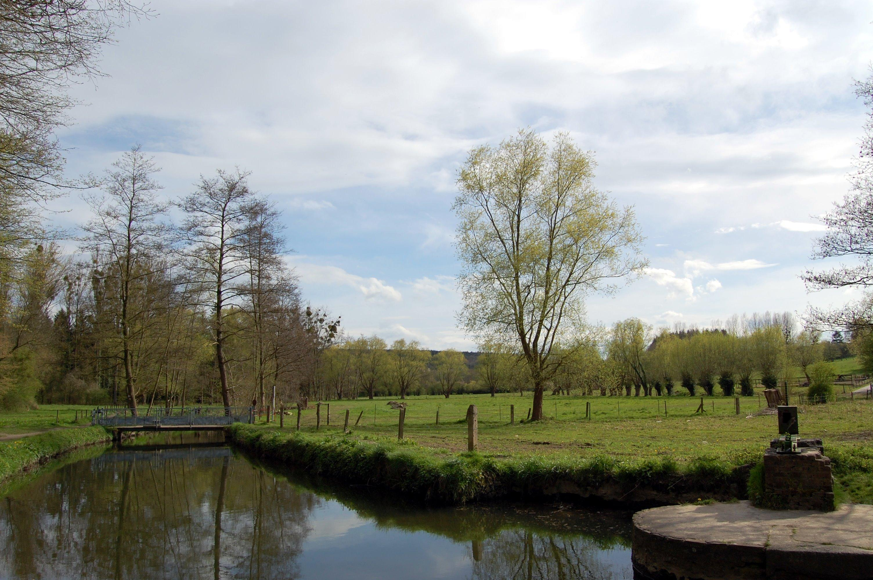 Aiseau (Aiseau-Presles, province de Hainaut, Belgique)